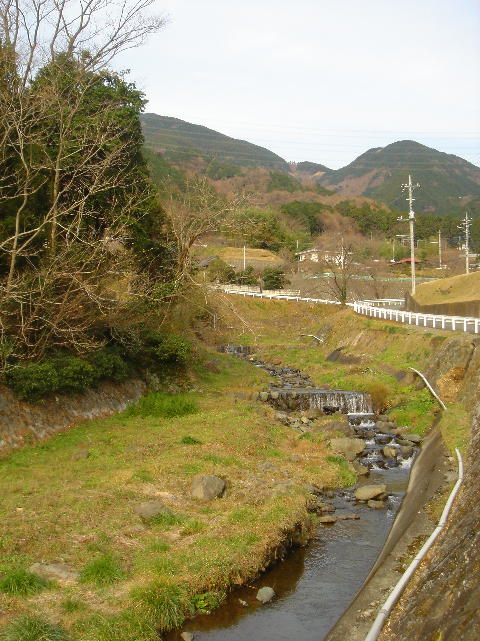 新田川、四山橋より上流にて